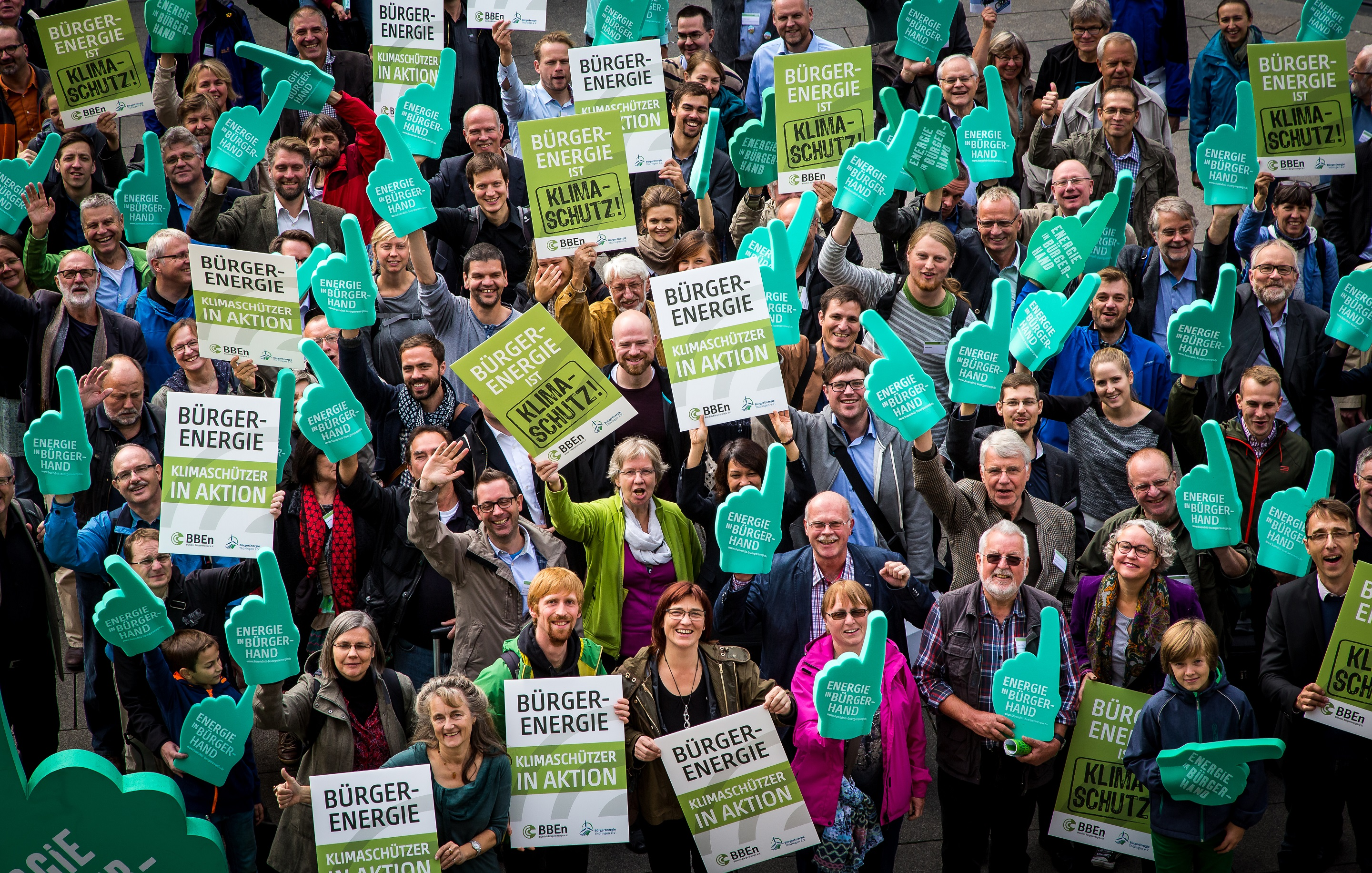 Bündnis Bürgerenergie e.V.